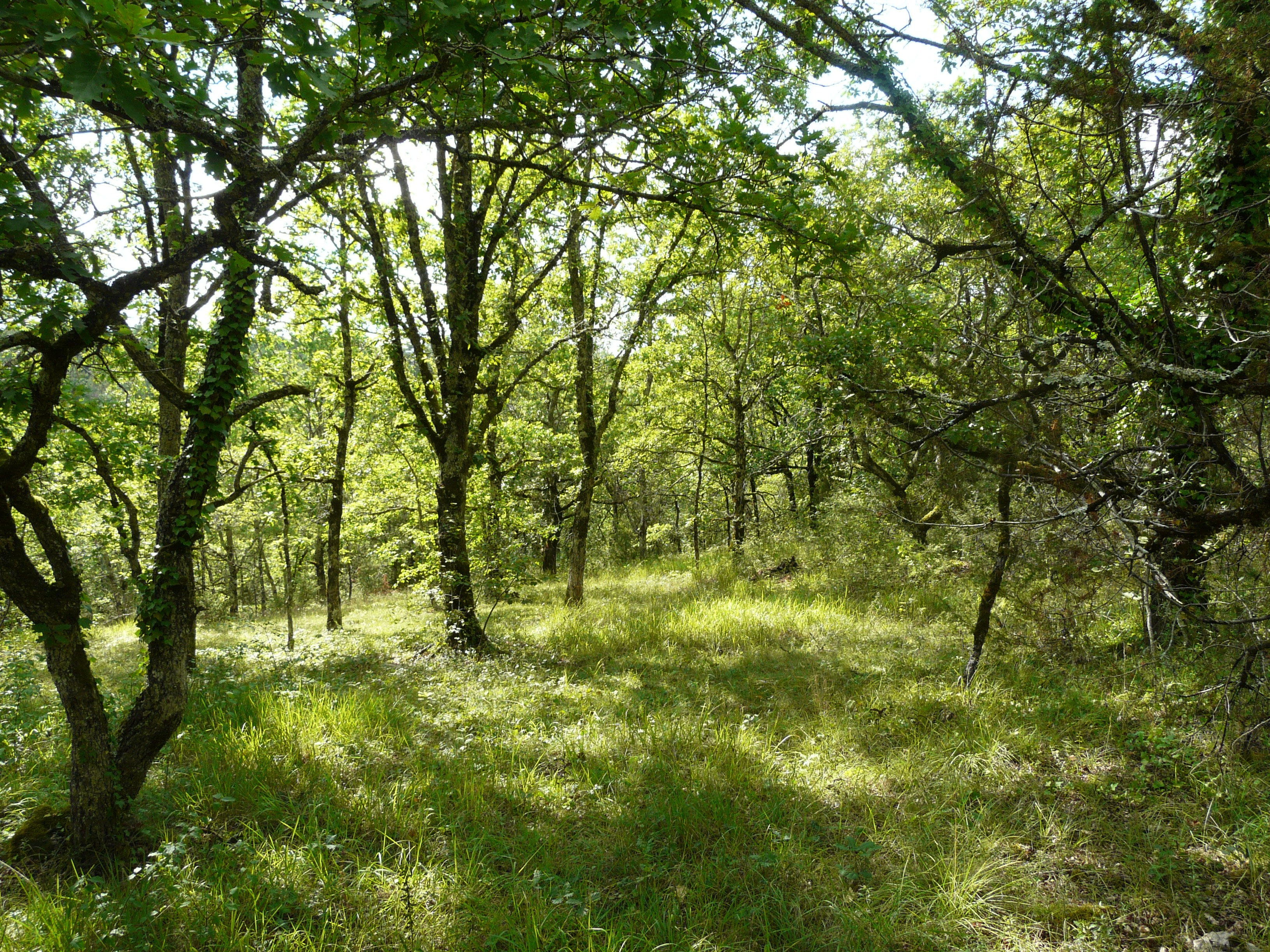 Le causse de Cubjac au nord de Petit Grand Champ, Sainte-Eulalie-d'Ans, Dordogne, France.